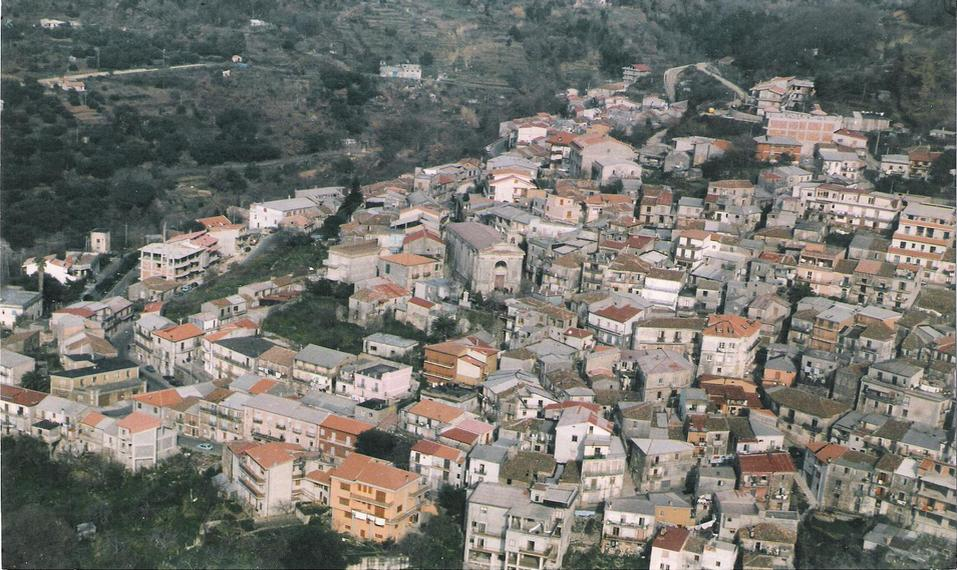 San Nicola da Crissa vista dall'alto